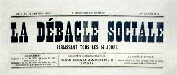 La Débâcle Sociale, journal anarchiste publié en Belgique en 1896.